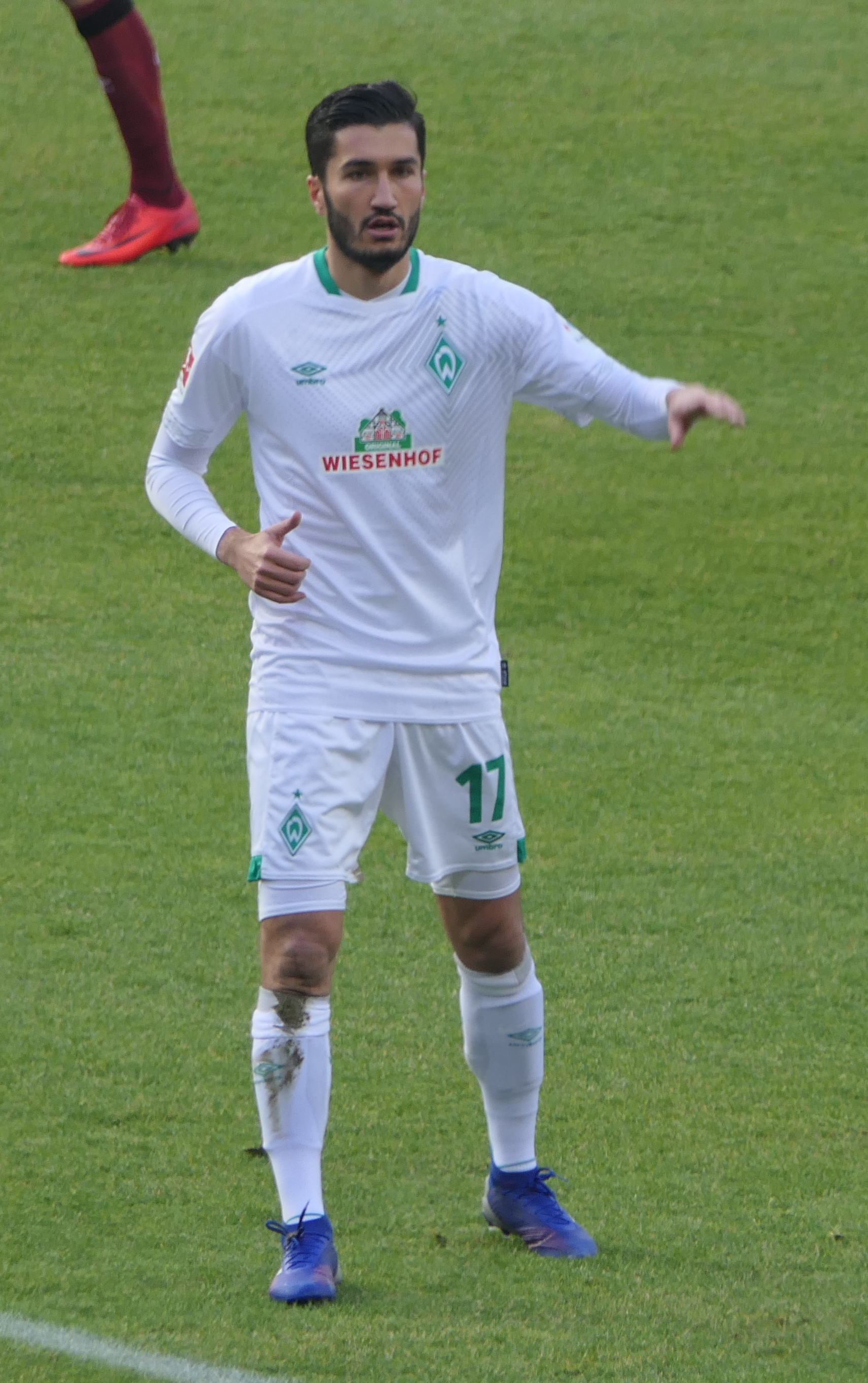 Der Fussballprofi Nuri Sahin im Trikot vom SV Werder Bremen beim Auswärtsspiel gegen den 1.FC Nürnberg am 02.02.2019.